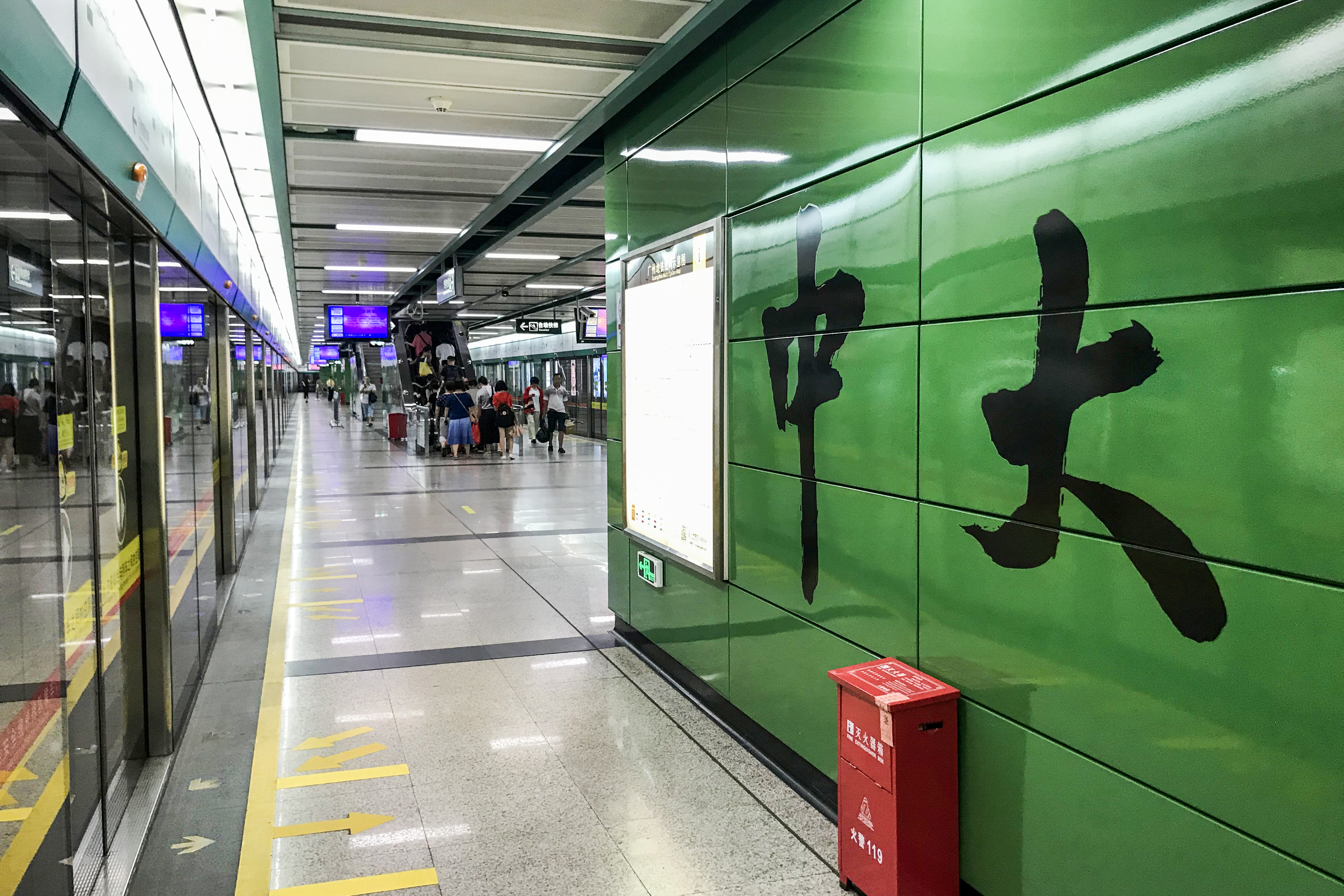 广州地铁中大站